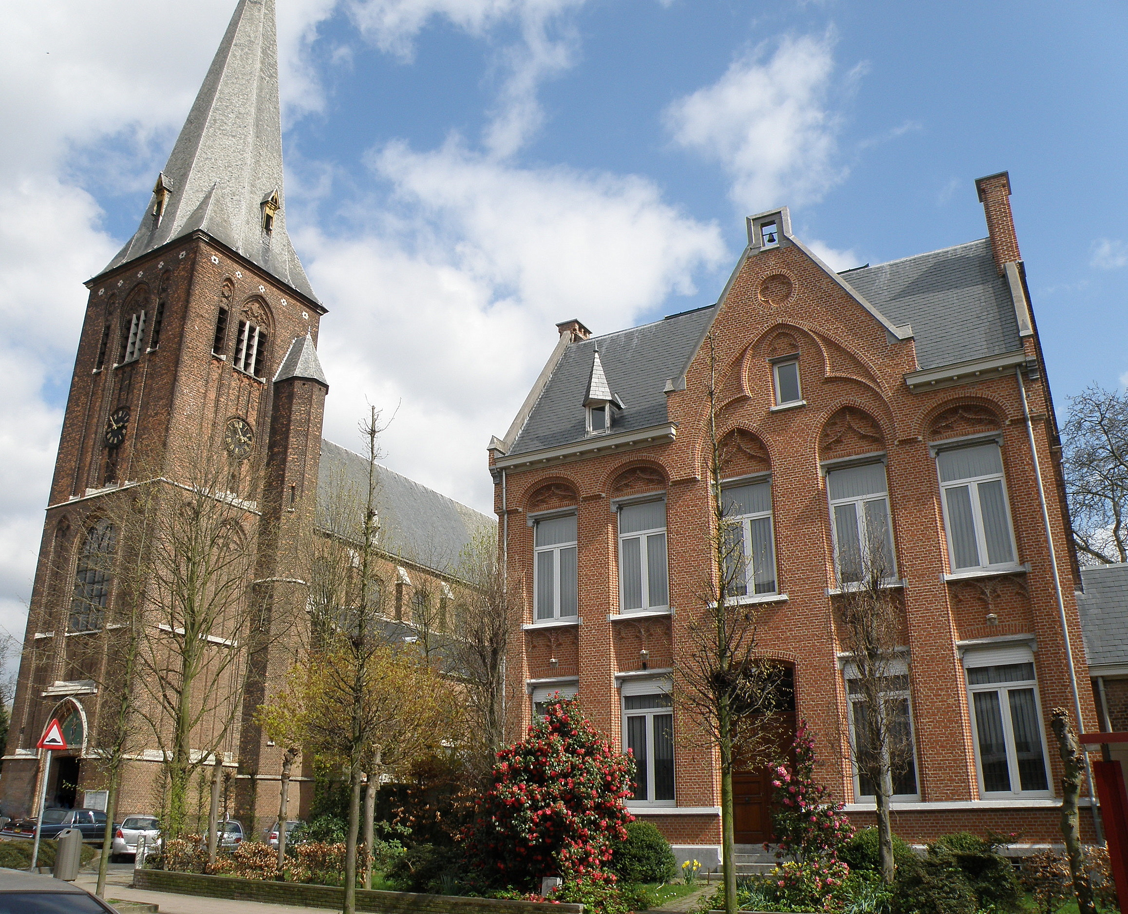 Antwerpen, district Deurne, Sint-Rochusstraat. Neo-gotische parochiekerk Sint-Rochus, ontwerp van archit. Frans Baeckelmans (1892-1894). Vgl. verder Inventaris Bouwkundig Erfgoed.